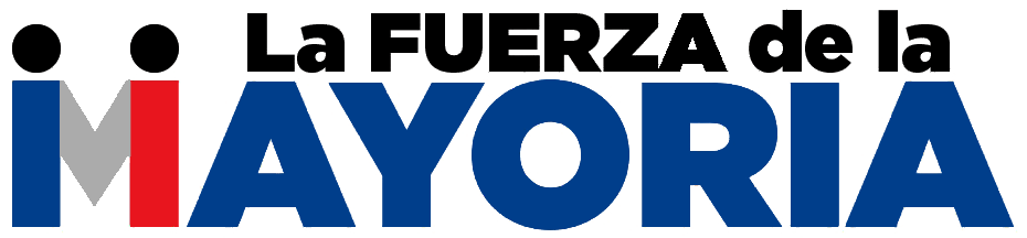 Símbolo de La Fuerza de la Mayoría, coalición política chilena.